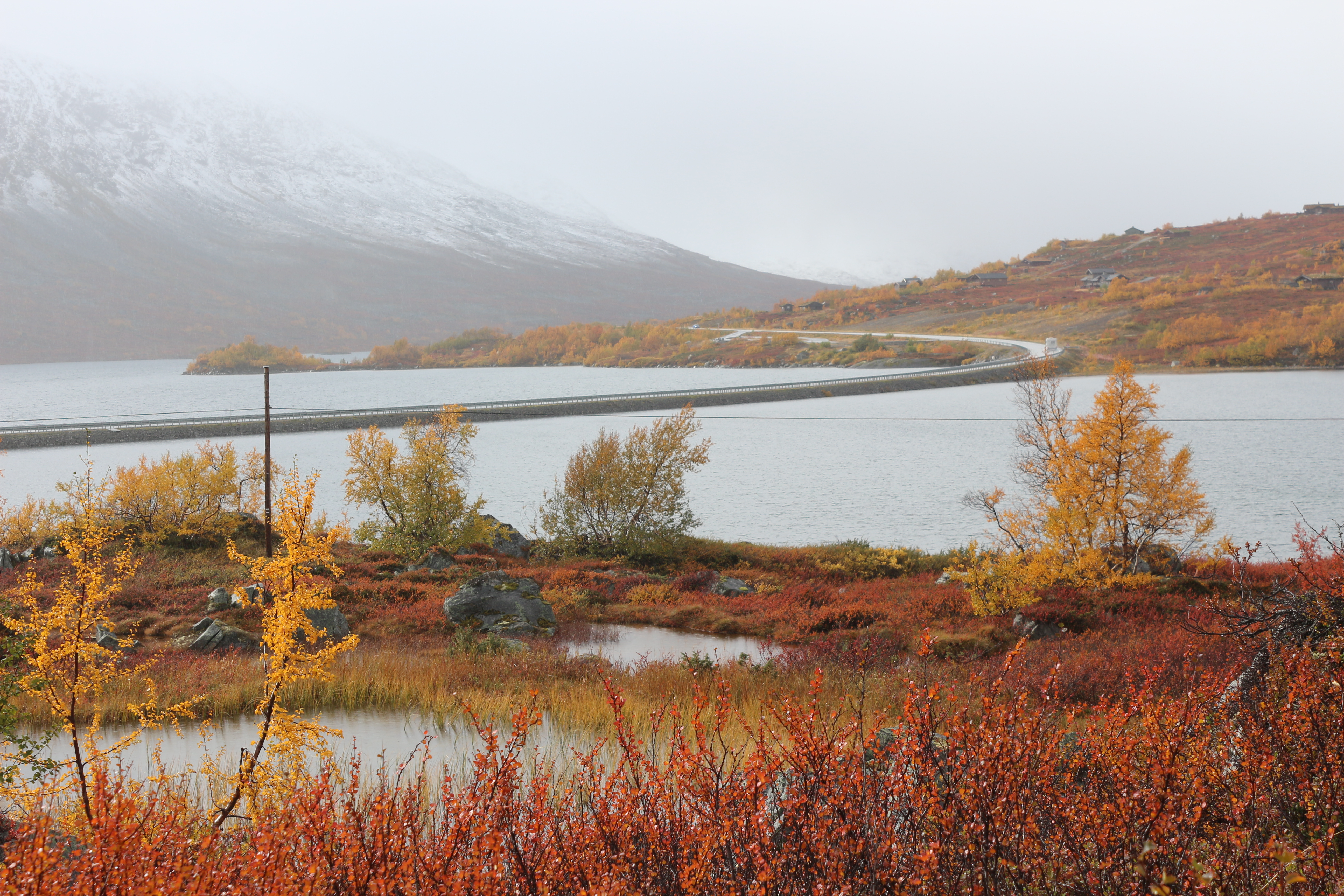 Riksveg 15 gjennon Hamseviken i Breiddalsvatnet